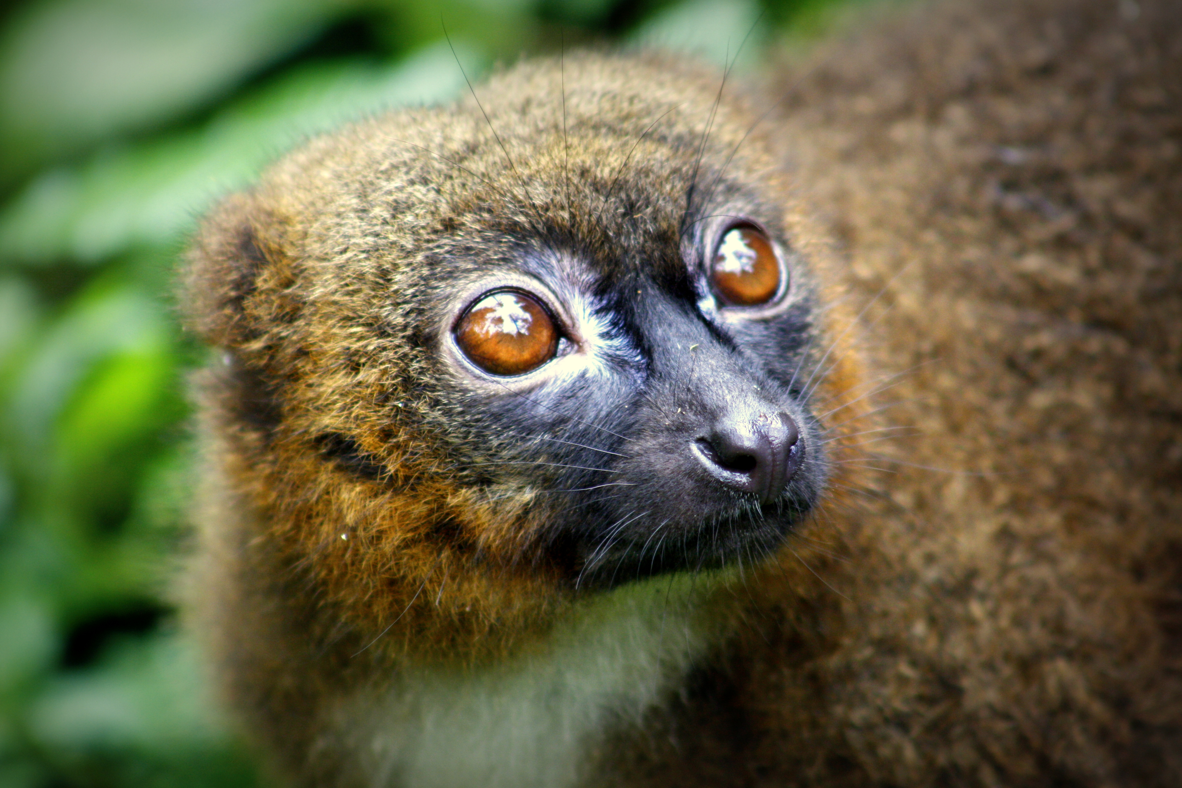 roodbuikmaki, foto genomen in Apenheul, Apeldoorn, Nederland